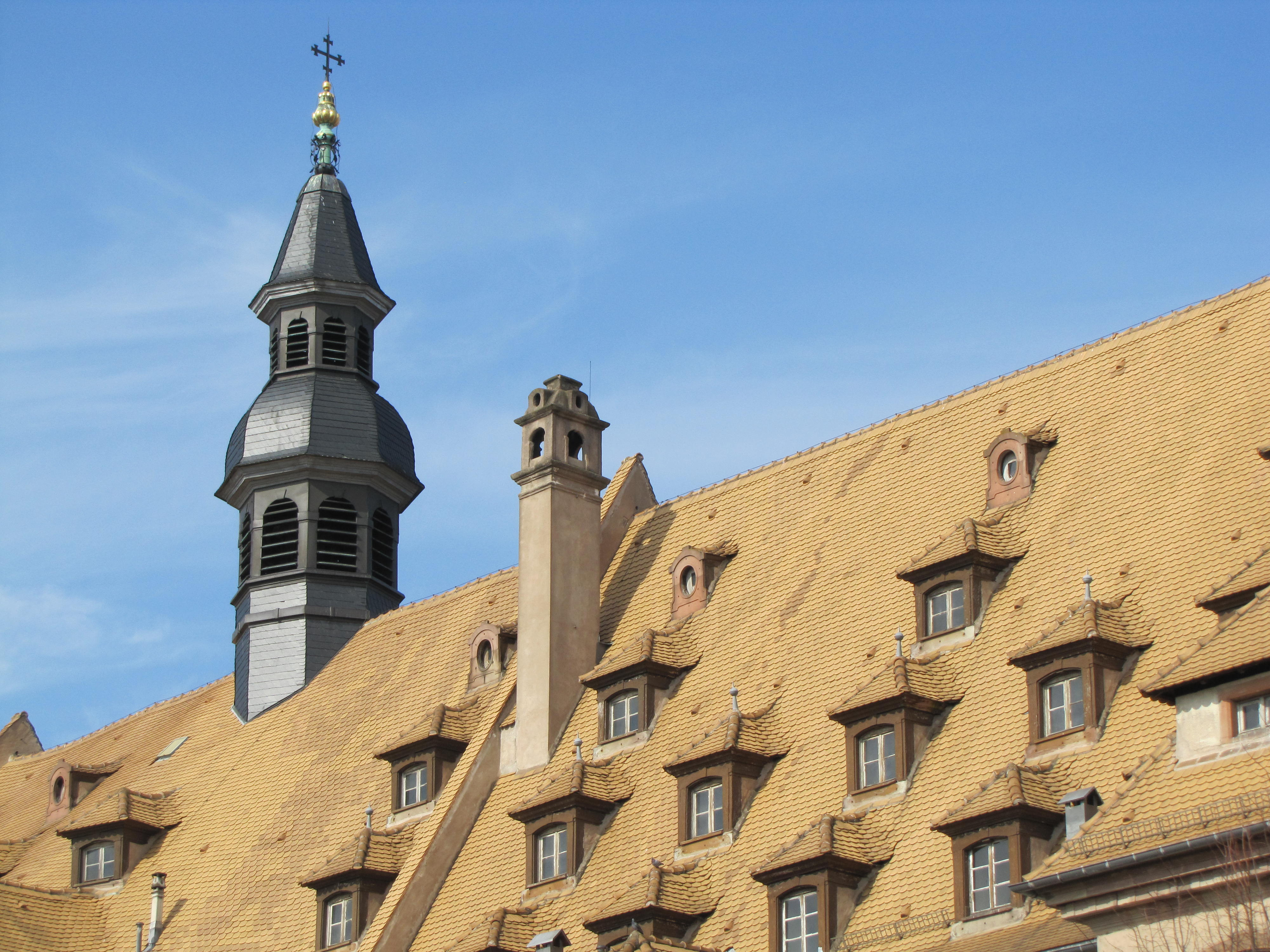 Alsace, Bas-Rhin, Strasbourg, Hôpital civil, place de l'Hôpital: Bâtiment principal (XVIIIe). .